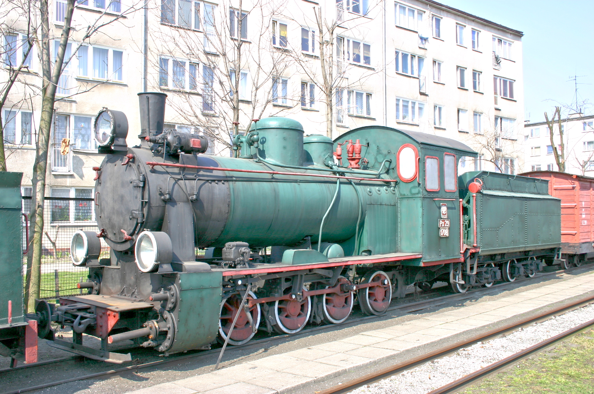 Dampflok Px 29-1708 ex 99 2578 ex Wp 29-1732 Warszawa 185/1929 in Sochaczew 05.April 2005